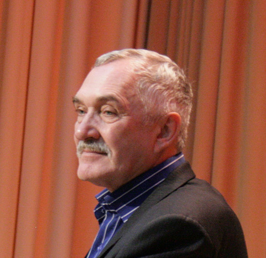 Встреча В. Н. Мегре с читателями. Белгород, 12 октября 2013 г.